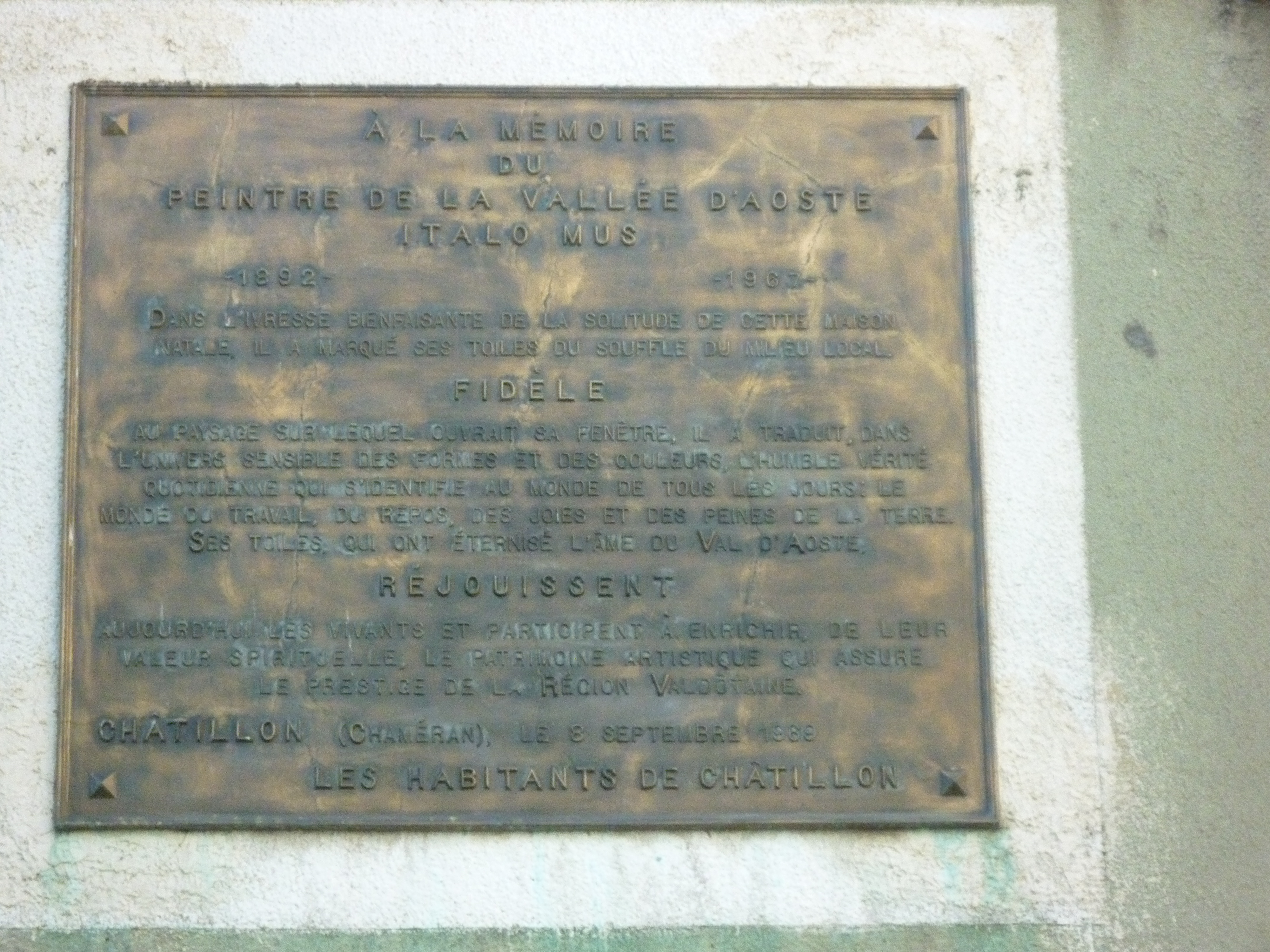 Plaque dédiée à Italo Mus à Chameran (Châtillon, Vallée d'Aoste)